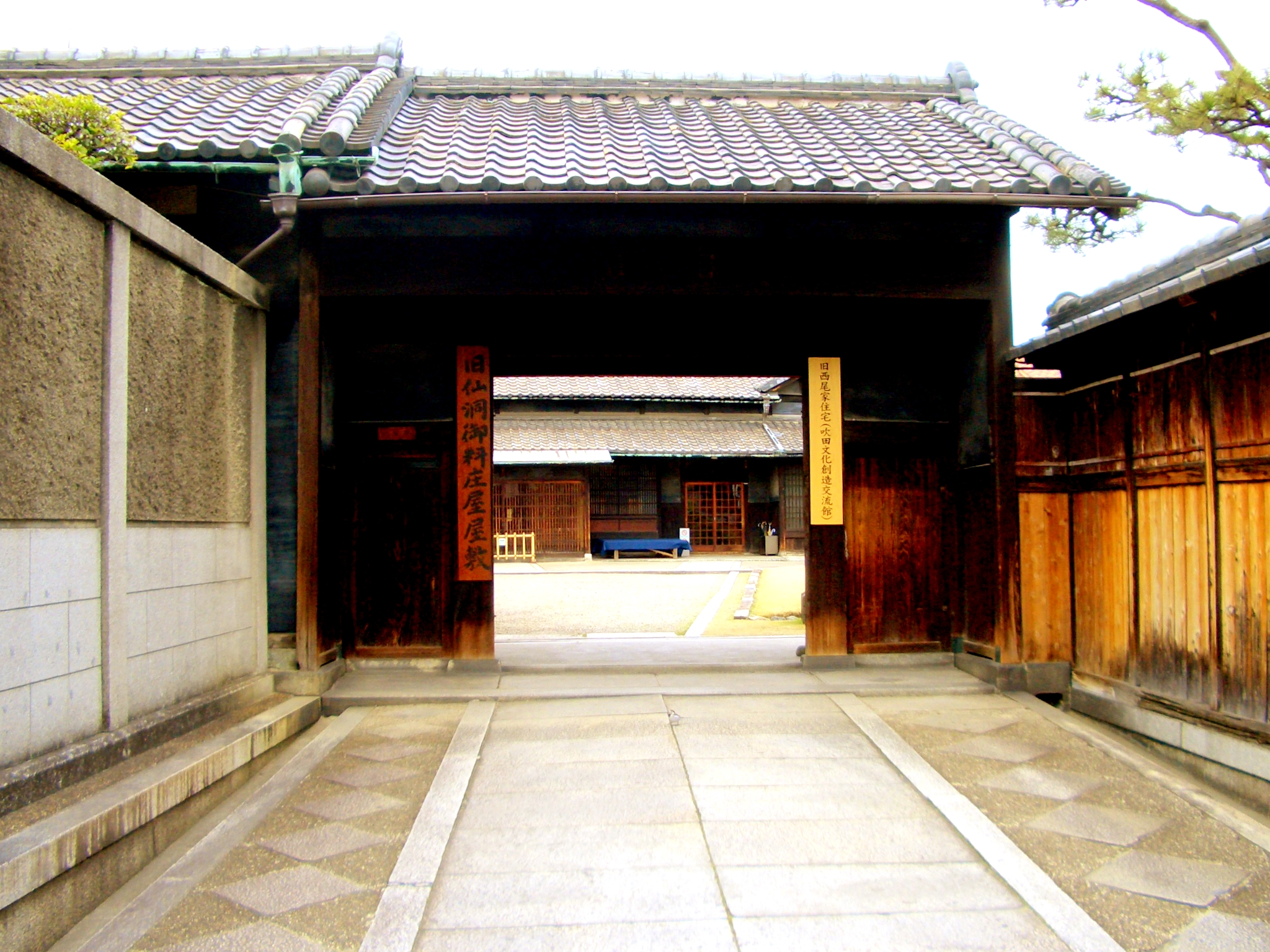 Sendougoryou Yashiki in Suita city,Osaka,Japan.